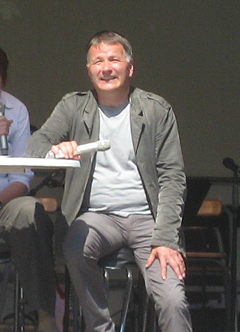 Thomas Rühmann bei der Veranstaltung „Hauptsache gesund!?“ zum 33. Deutschen Evangelischen Kirchentag in Dresden